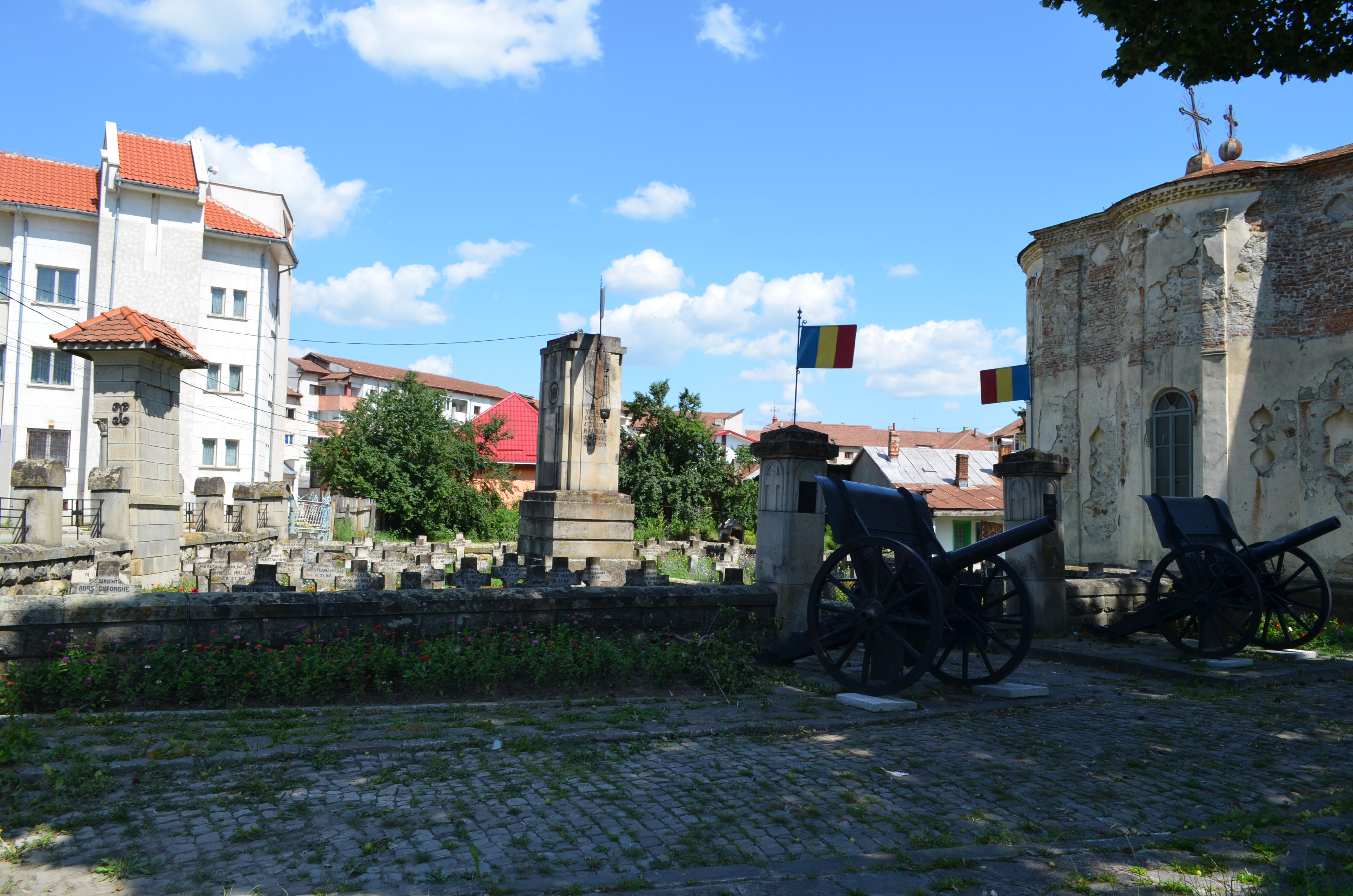 Cimitirul Eroilor (Ansamblul memorial 1916-1918), lângă Biserica Sf. Nicolae, Târgu Ocna 03